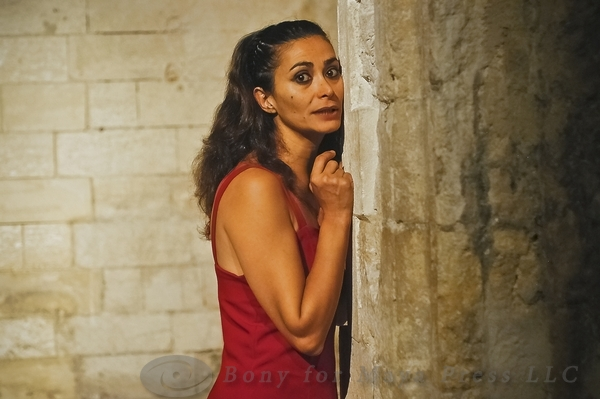 Darina Al-Joundi dans la pièce "Le jour où Nina Simone a cessé de chanter"